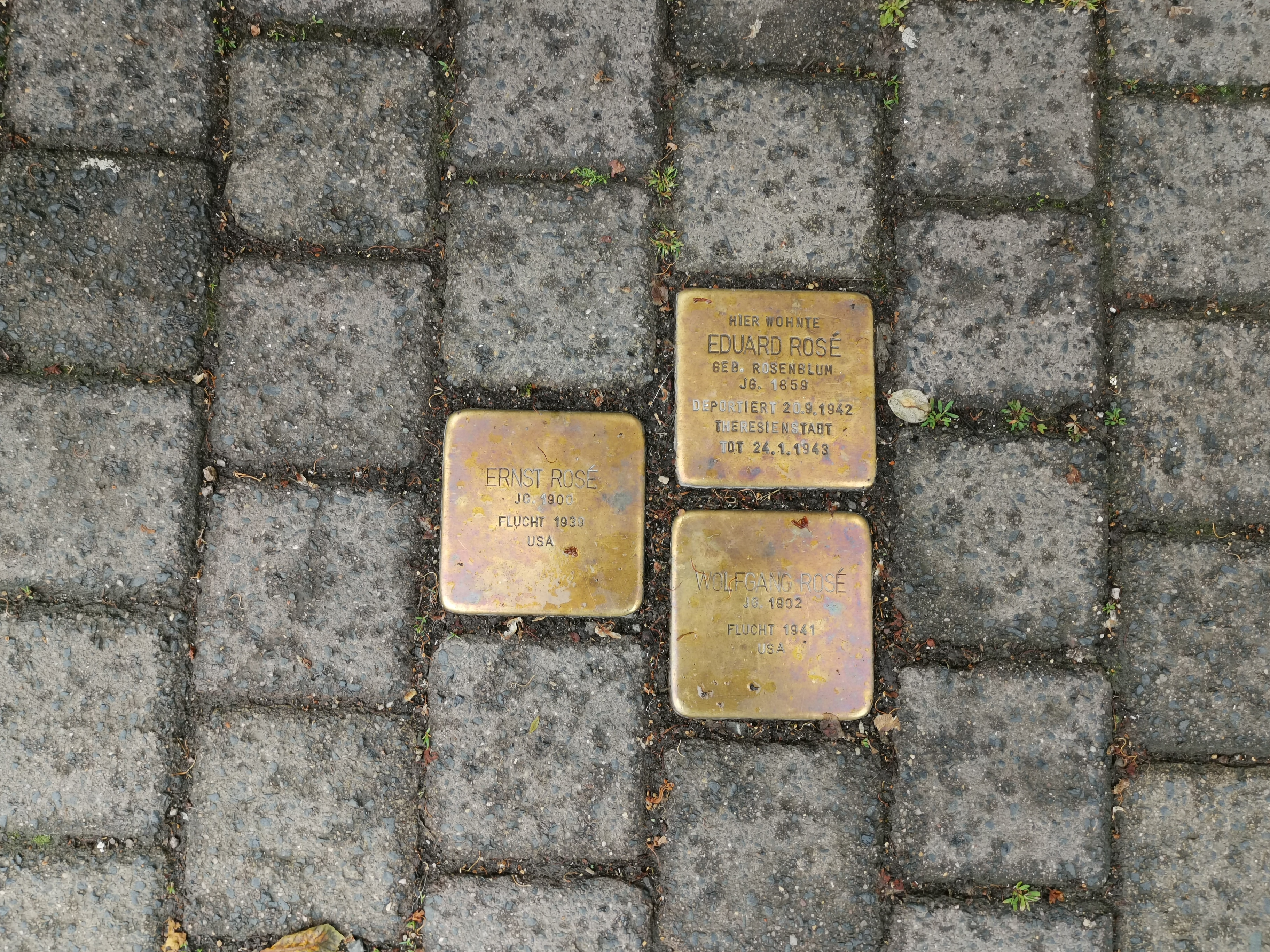 Stolpersteine für Familie Roséin der Marienstraße in Weimar